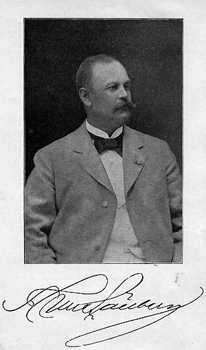 Thurer Sällberg (1854-1908)